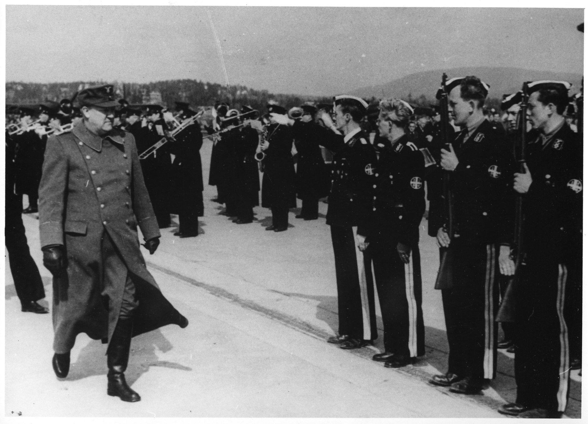 RA/PA-1209/Ue 96/ (img084)